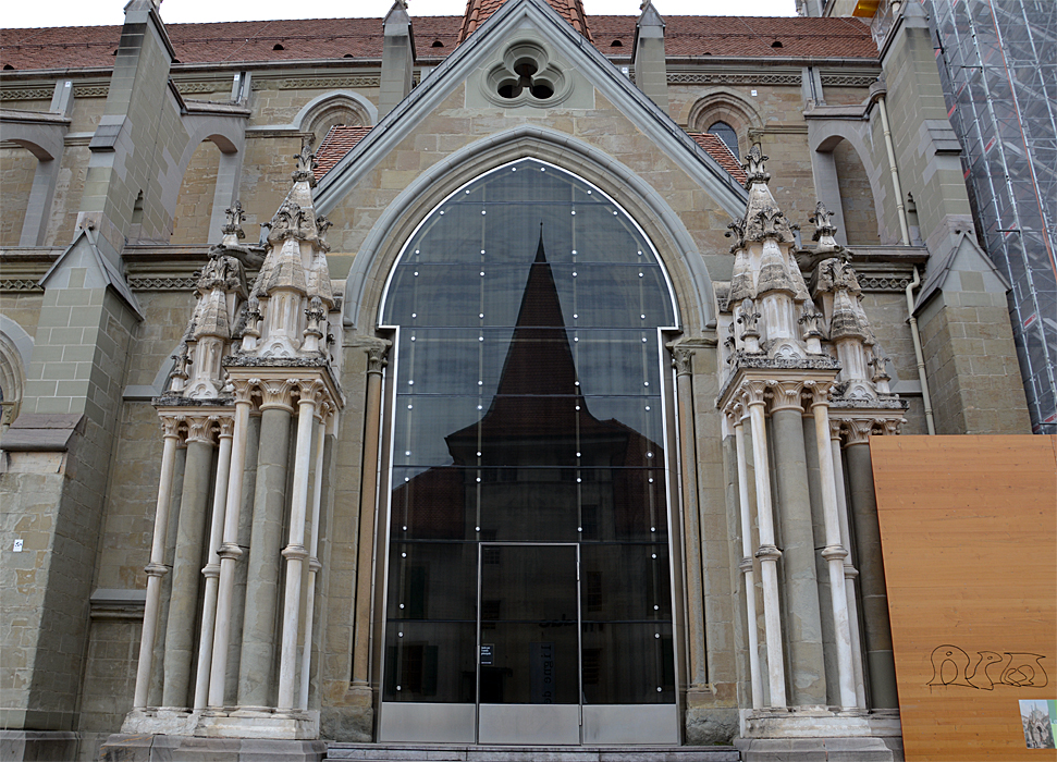 Portail peint, Cathédrale Notre-Dame, Lausanne